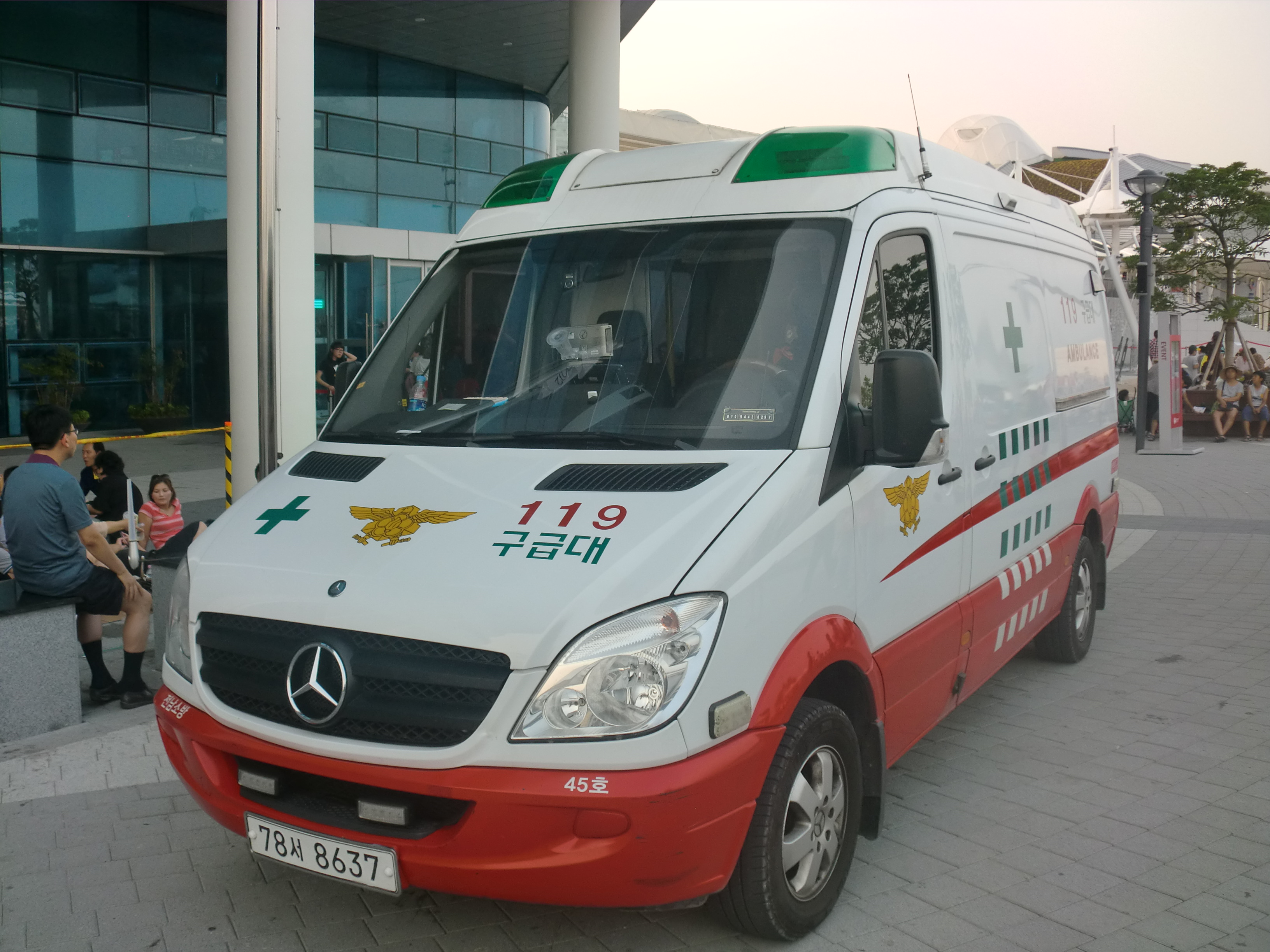 전남소방본부의 구급차(여수엑스포에서)